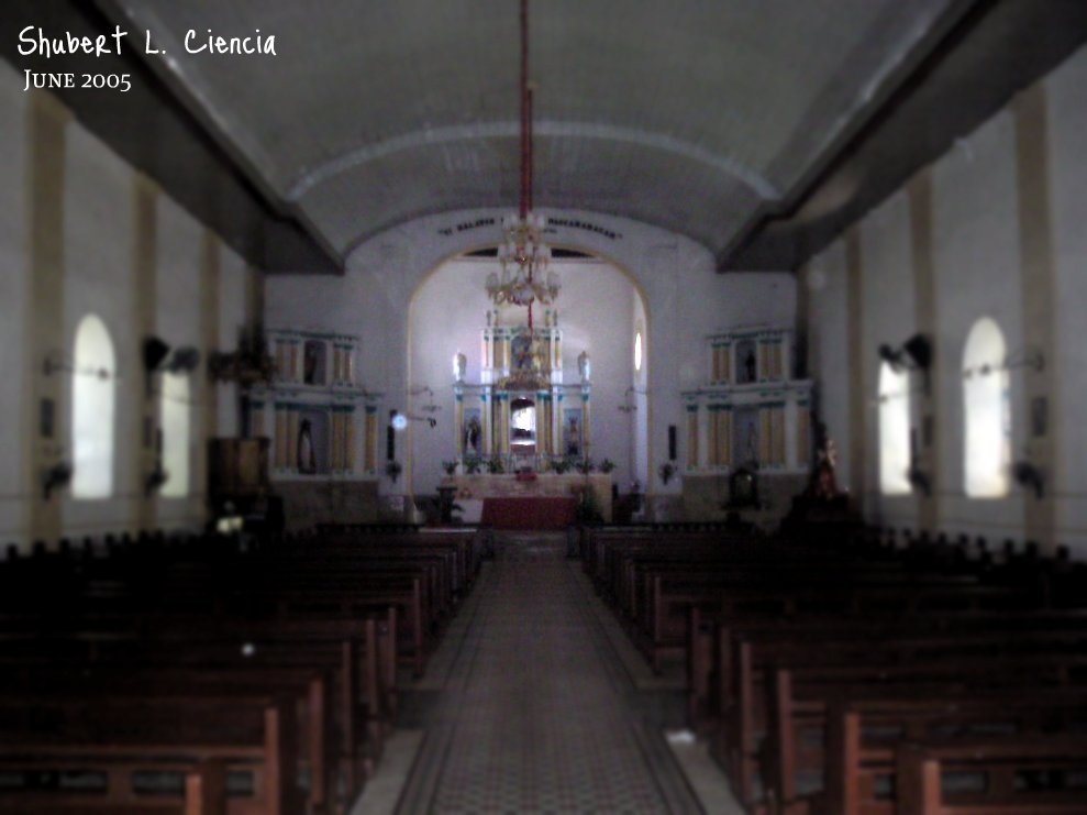 Main altar.